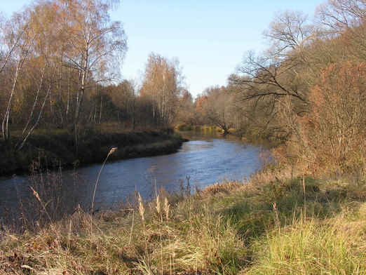 Metų laikai: ruduo Foto: Algirdas, 2005-11-01